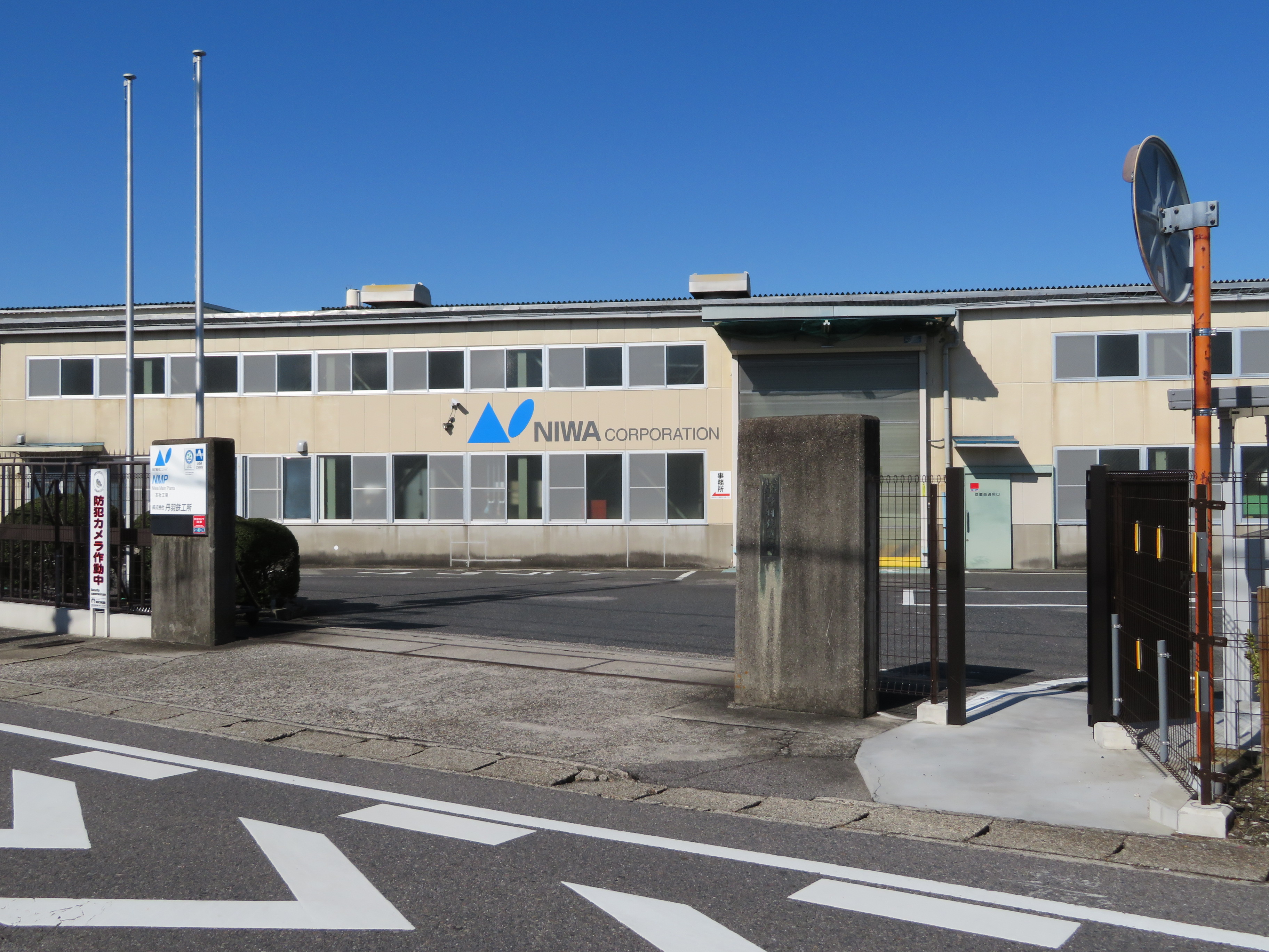 丹羽鉄工所（岡崎市渡町）